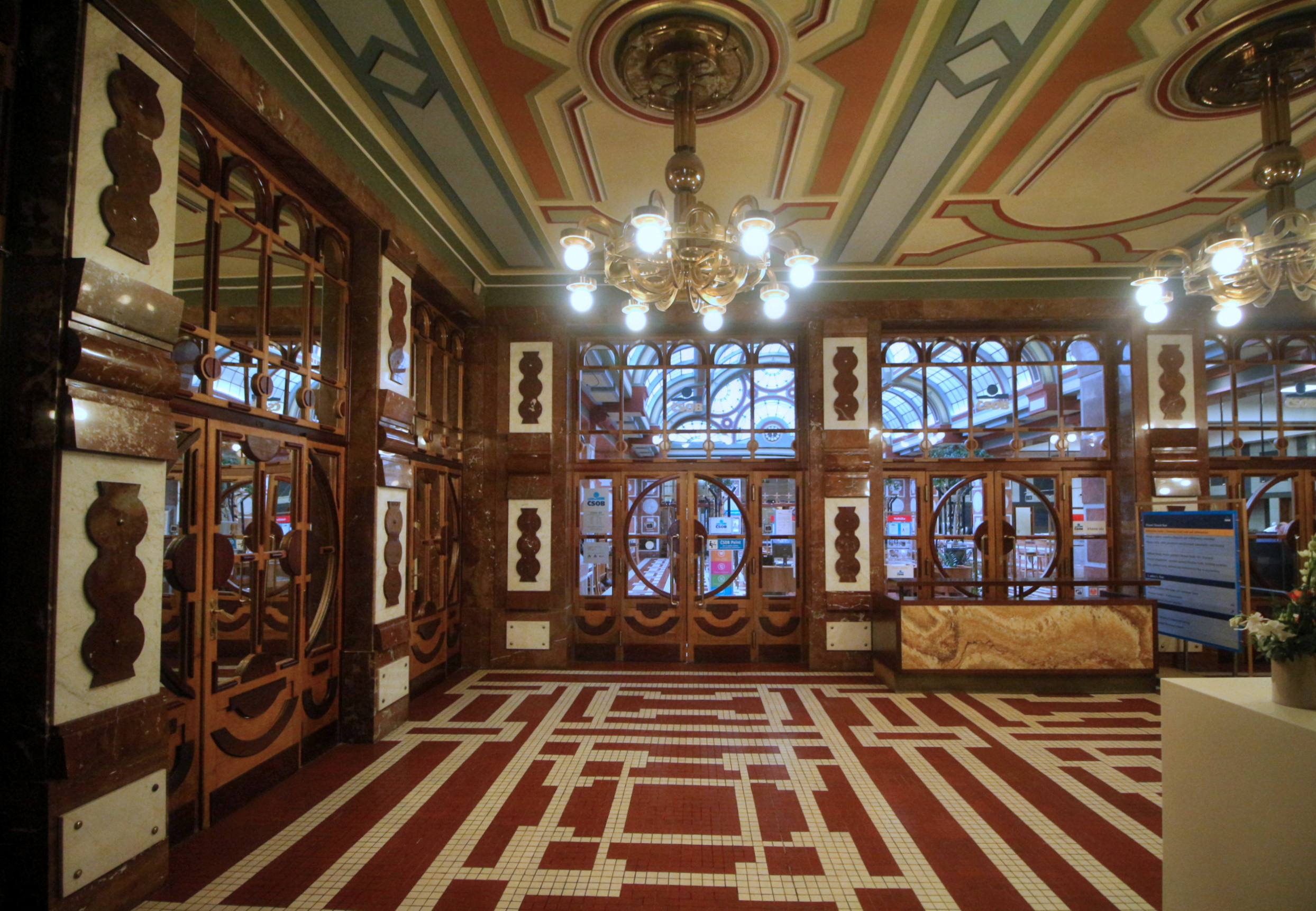 Praha, ulice Na Poříčí, rondokubistická budova banky